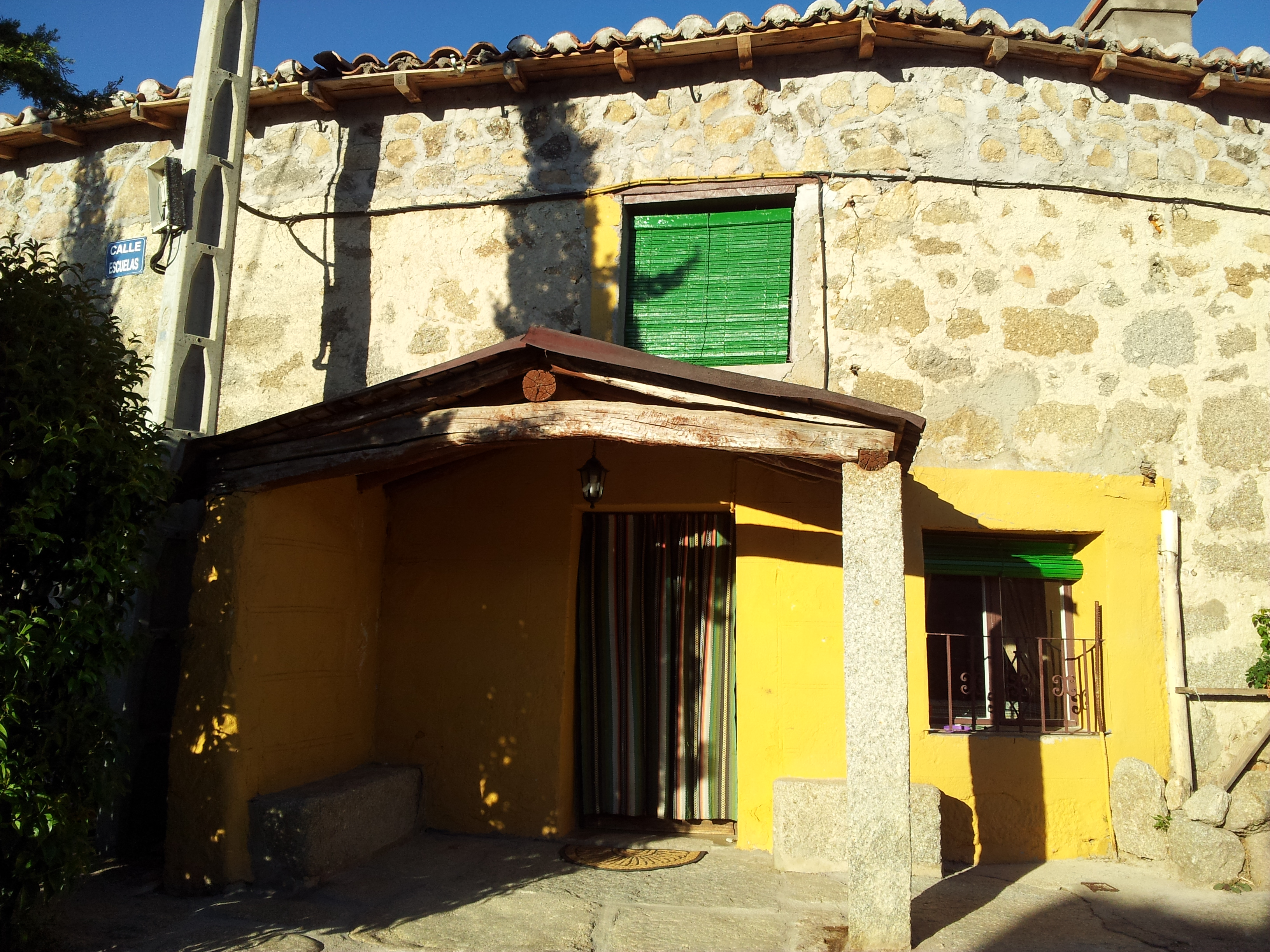 Portalillo en Guareña, Ávila, España.